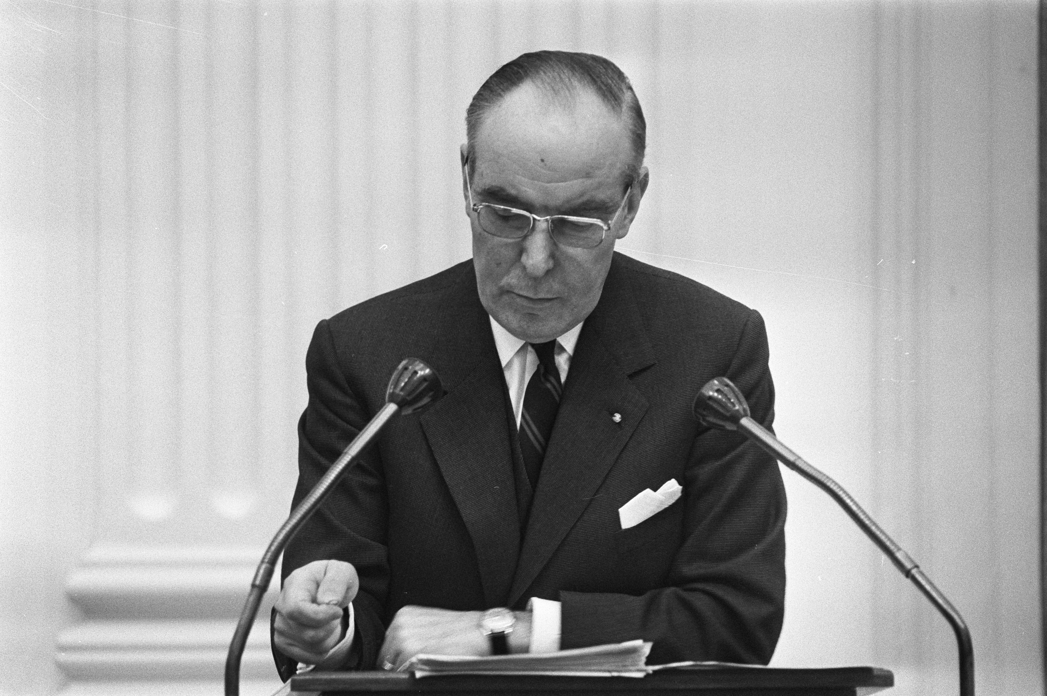 Collectie / Archief : Fotocollectie Anefo Reportage / Serie : [ onbekend ] Beschrijving : Minister van Volksgezondheid en Milieuhygiëne Stuyt tijdens een debat in de Tweede Kamer in Den Haag Datum : 1 december 1971 Locatie : Den Haag, Zuid-Holland Trefwoorden : ministers, parlementaire debatten, politiek Persoonsnaam : Stuyt, L.B.J. Fotograaf : Peters, Hans / Anefo Auteursrechthebbende : Nationaal Archief Materiaalsoort : Negatief (zwart/wit) Nummer archiefinventaris : bekijk toegang 2.24.01.05 Bestanddeelnummer : 925-1996